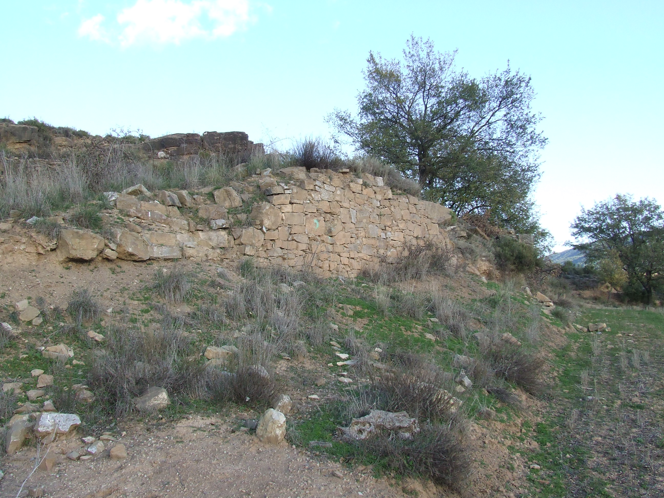 Cal Gassó (Abella de la Conca, Pallars Jussà)